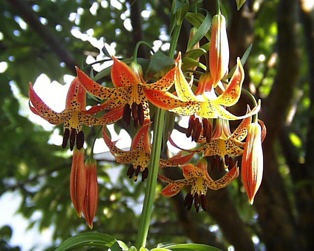 Lilium canadense var. coccineum